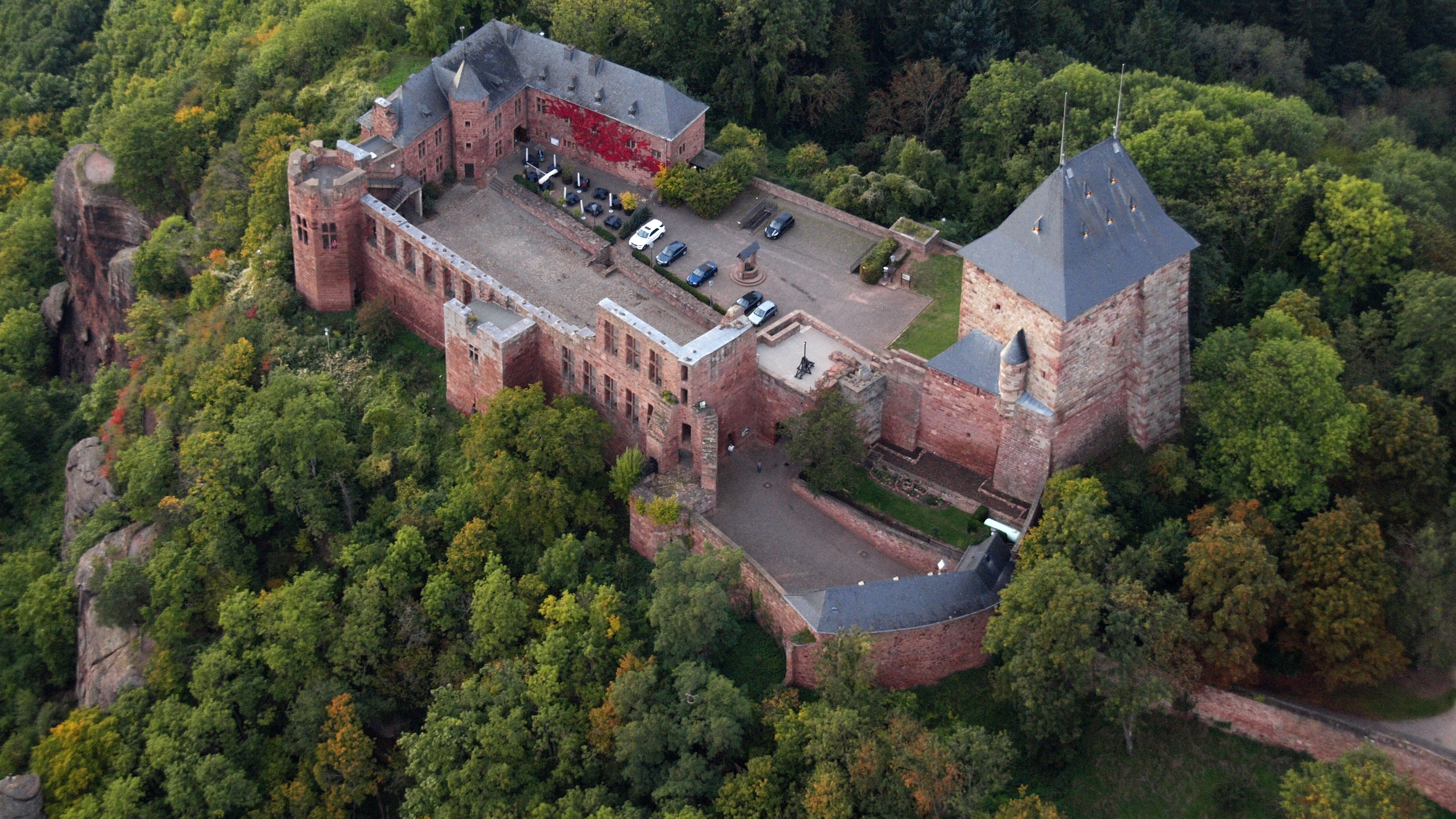 Burg Nideggen, Ansicht aus südöstlicher Richtung, Luftaufnahme (2015)